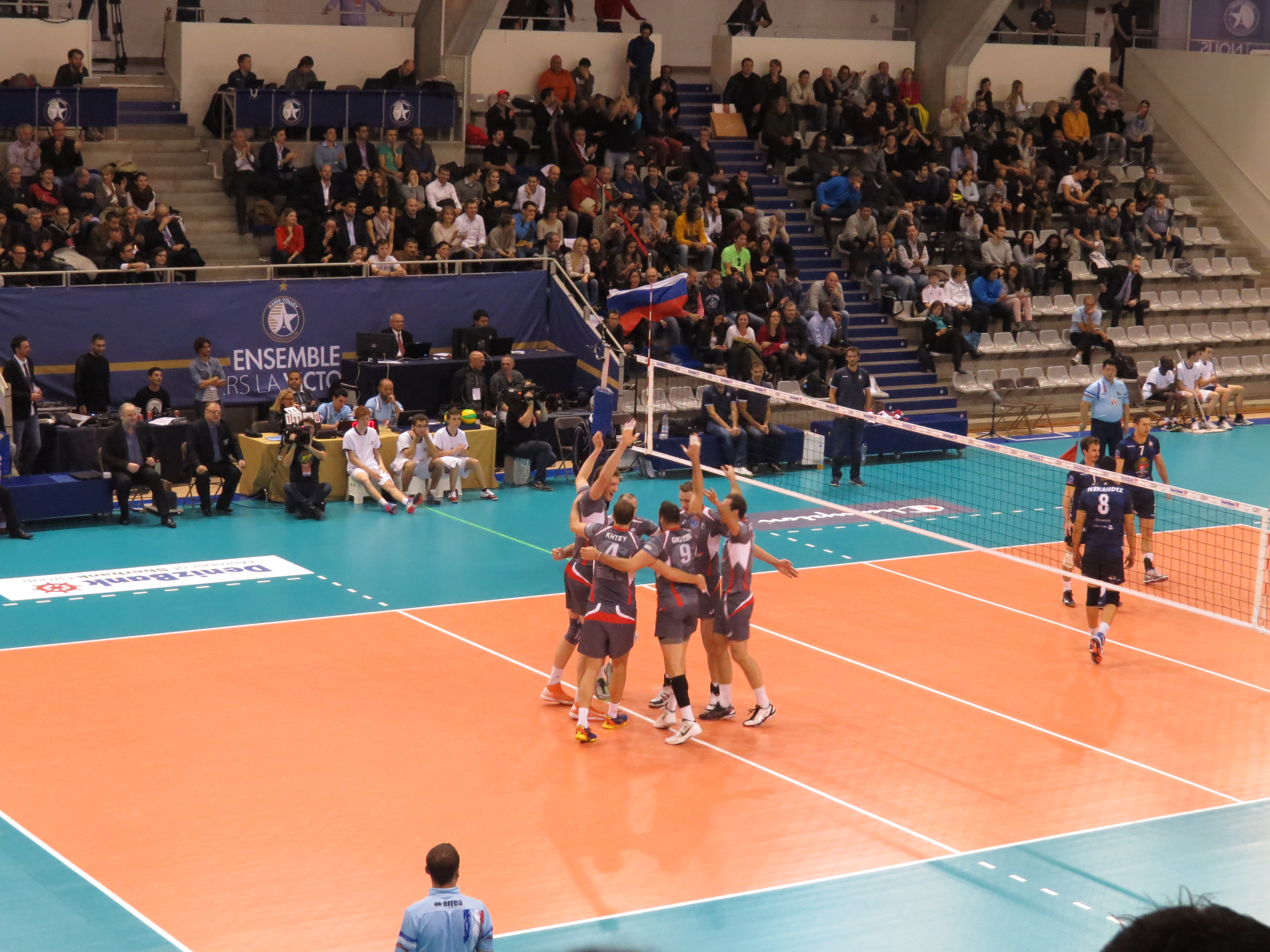 Photo réalisée lors du match de ligue des champions de volley entre le Paris Volley et le Lokomotiv Belgorod. Victoire de Belgorod 3-0